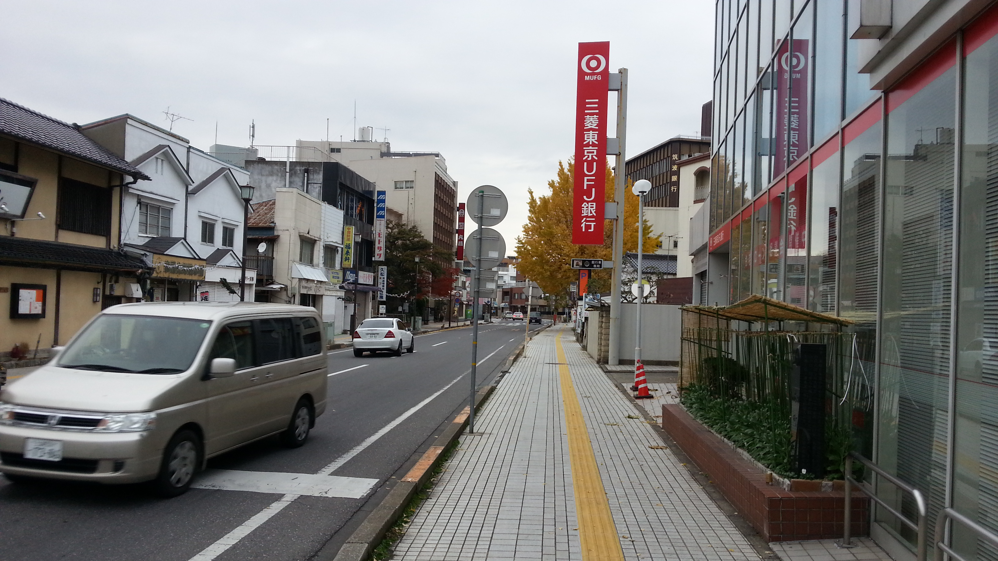 土浦市中央